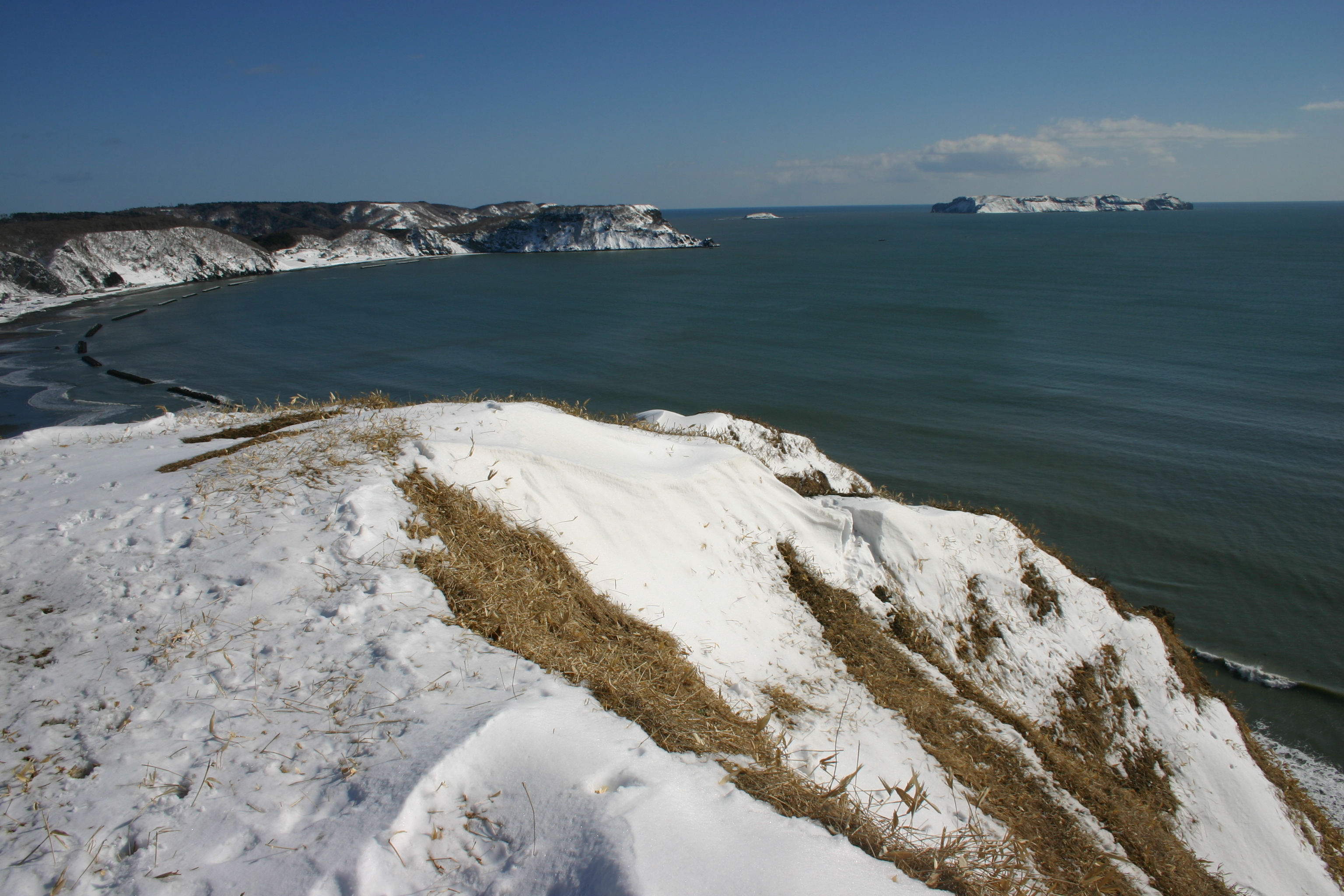 愛冠岬 厚岸道立自然公園